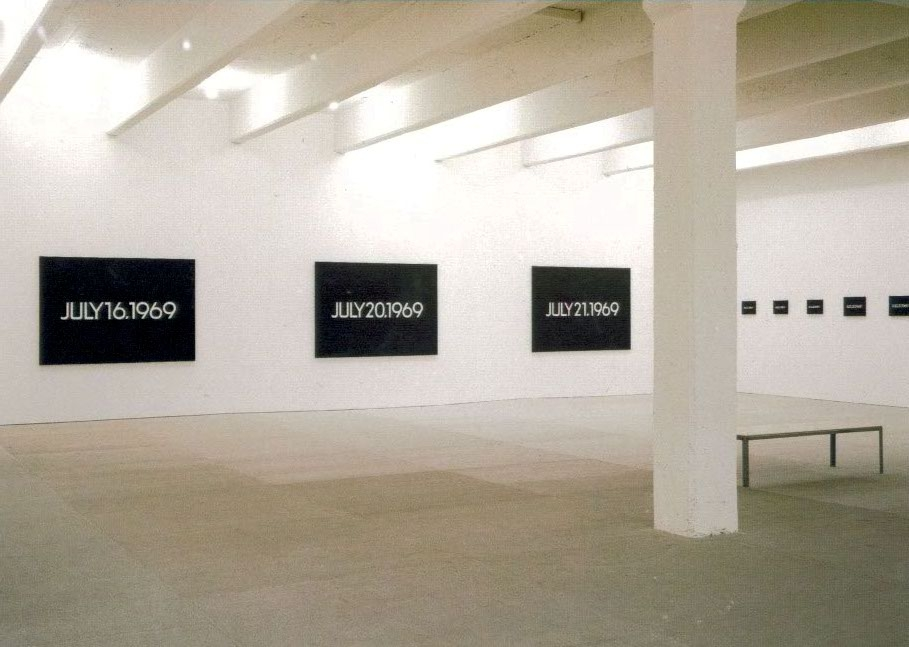 ภาพจากงานนิทรรศการงานของ อง คาวาระ ที่นิวยอร์ค ในภาพเป็นงาน วันที่วาดภาพ